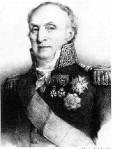 Général_Jean_Baptiste_Drouet